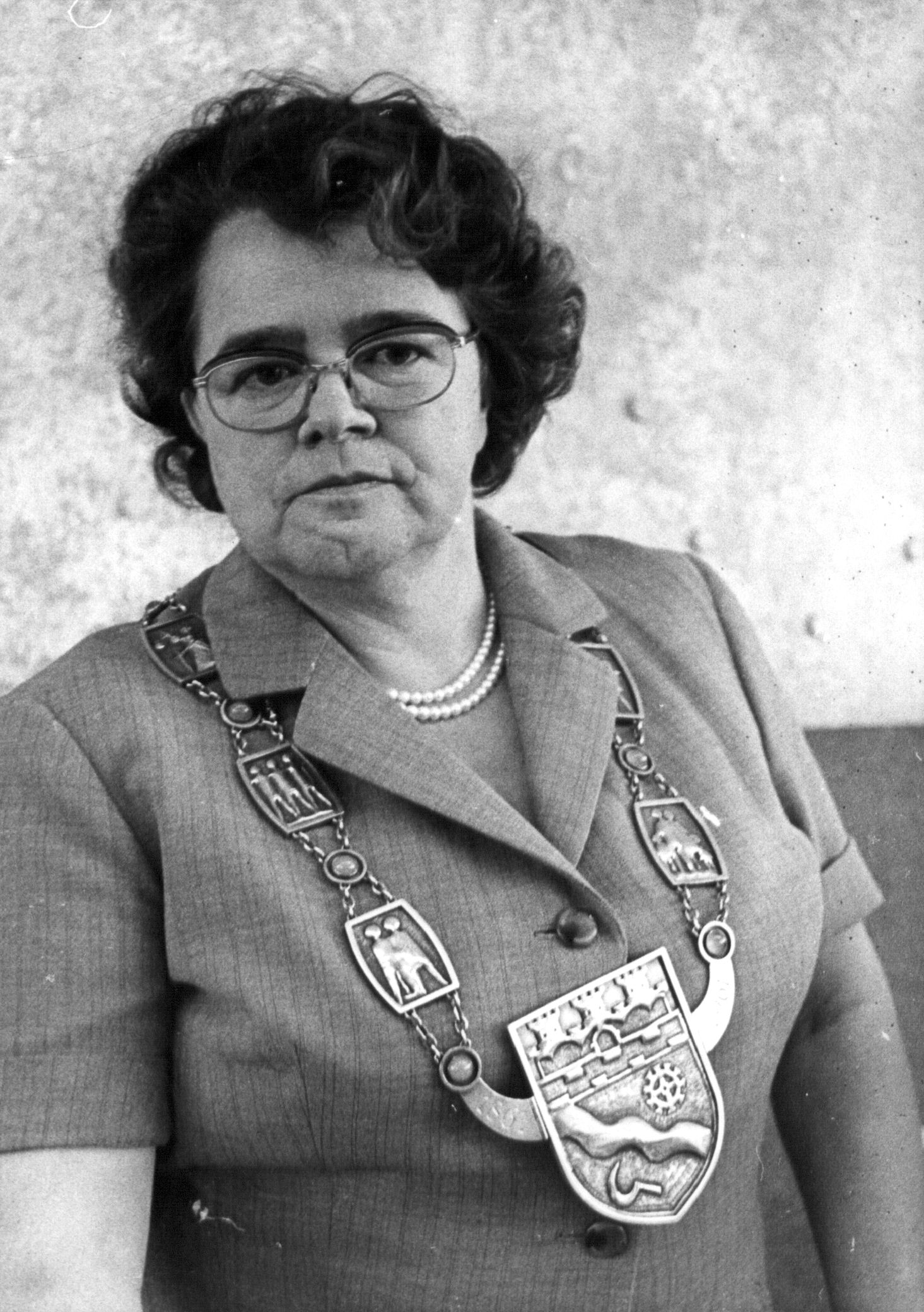 Ellen Wiederhold (* 21. November 1921 in Hilden; † 4. September 1995), Bürgermeisterin der Stadt Hilden (1969–1994) mit Amtskette